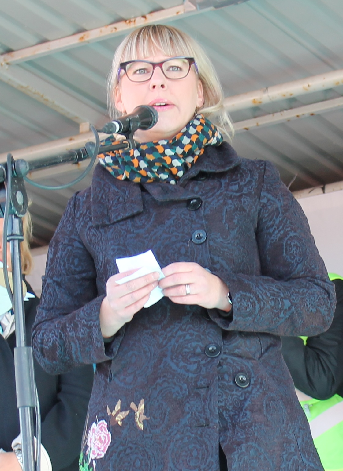 Aino-Kaisa Pekonen puhuu eläkeläisten mielenosoituksessa Helsingin Kansalaistorilla 8.10.2015